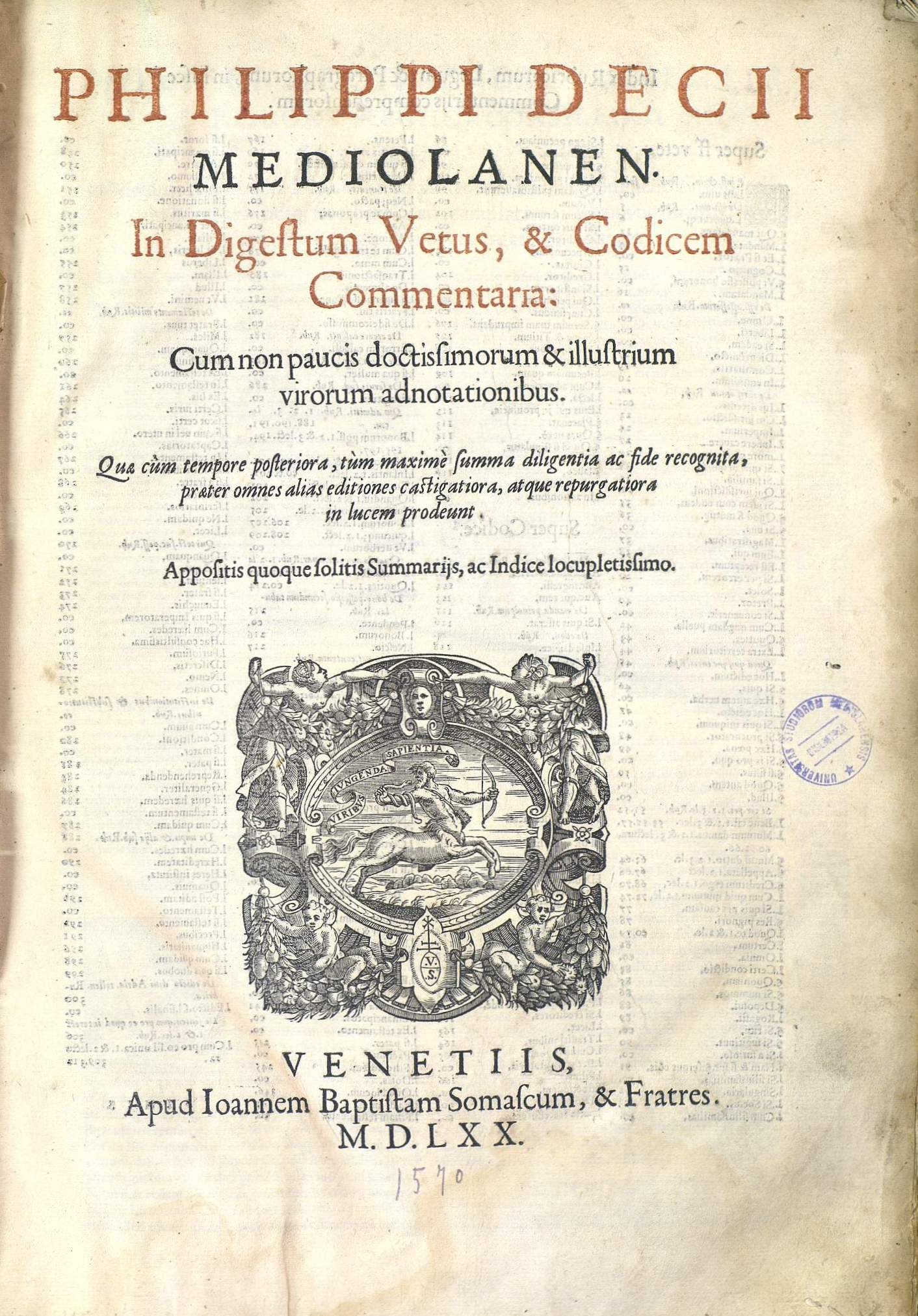 Frontespizio